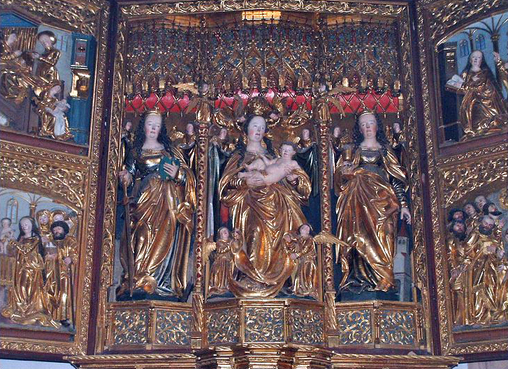 Spätgotischer Flügelaltar (Marienaltar) im Südchor der Pfarrkirche Mariae Himmelfahrt in Hallstatt von Meister Lienhart Astl.